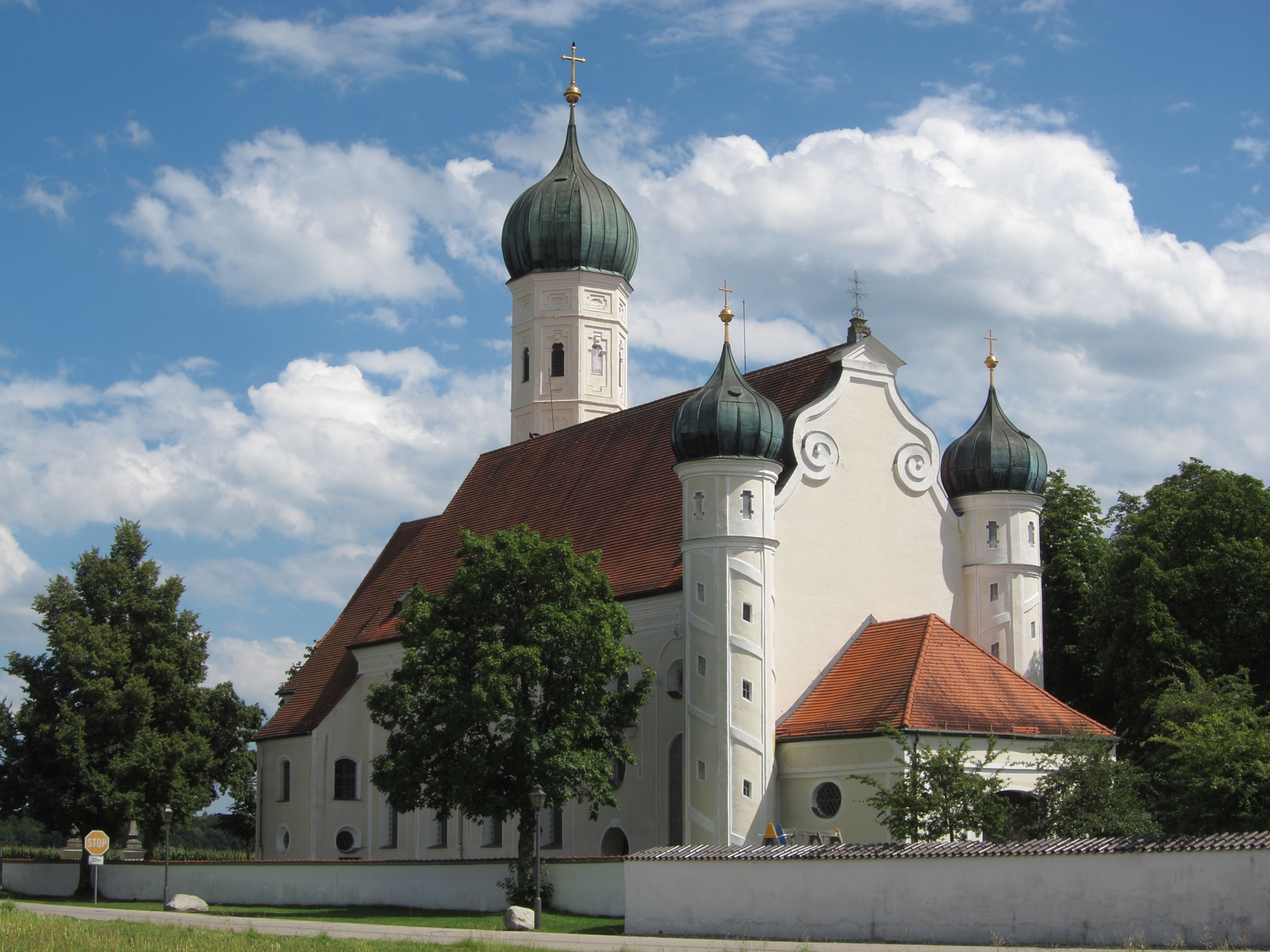 Möschenfeld; St. Ottilia, katholische Wallfahrtskirche, frühbarocker Saalbau mit Blendarkaden, stark eingezogenem Polygonalchor mit Chorflankenturm und zwei Treppentürmchen an der Westseite. Von Balthasar Wölkhamer unter Verwendung mittelalterlicher Mauern errichtet, ab 1640. Friedhofsmauer mit barocken Torpfeilern.